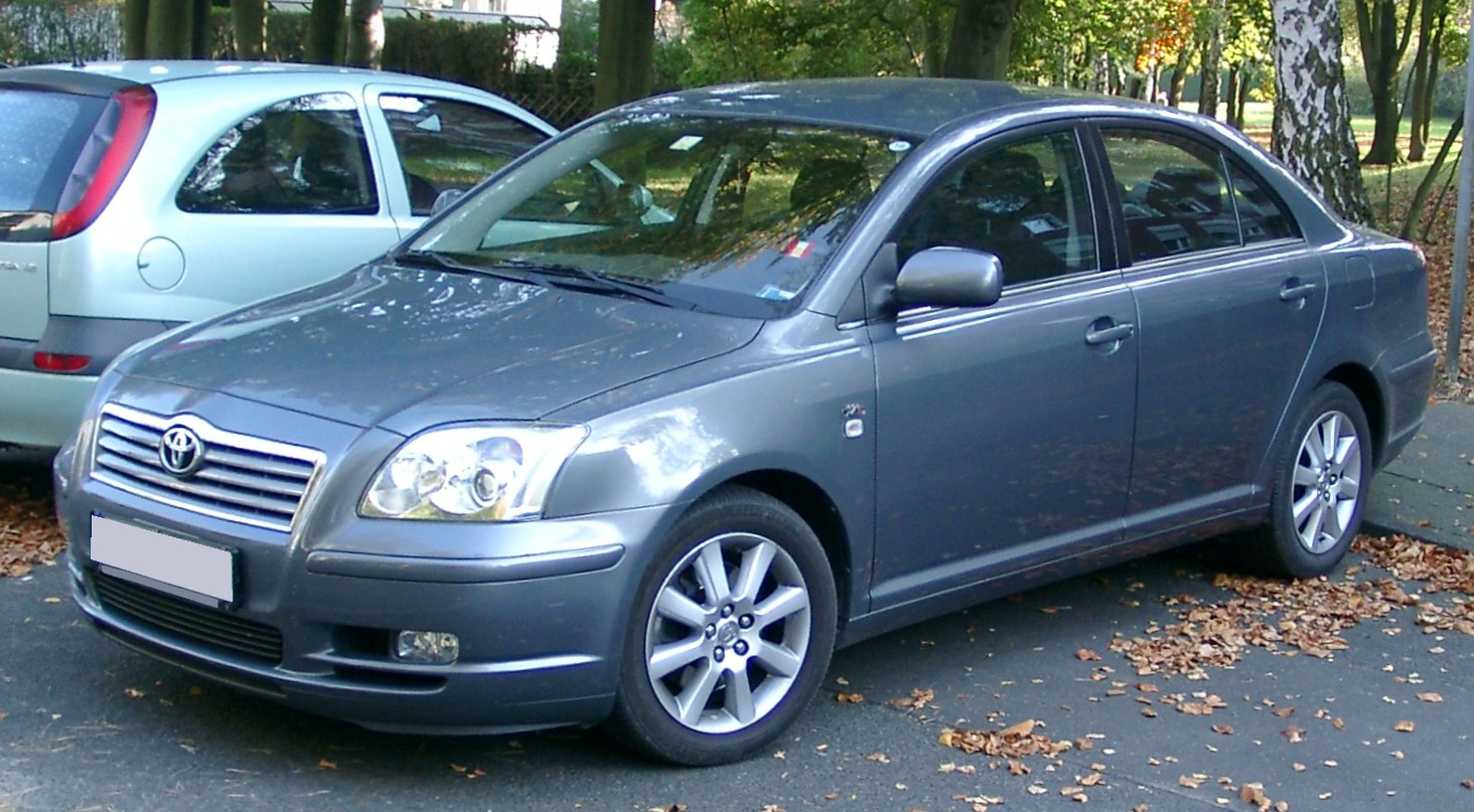 Toyota Avensis, 2. Generation